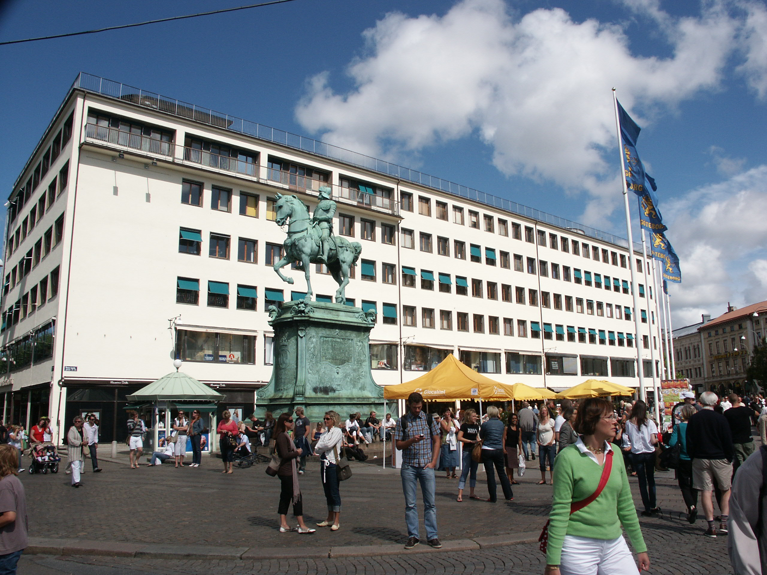 Kungsportplatsen, Gothenburg, Sweden